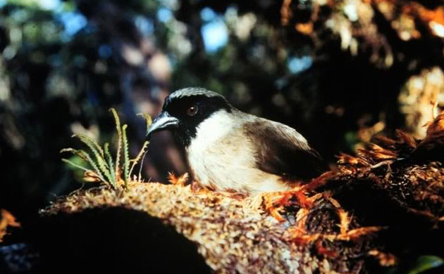 Poʻouli (Melamprosops phaeosoma)